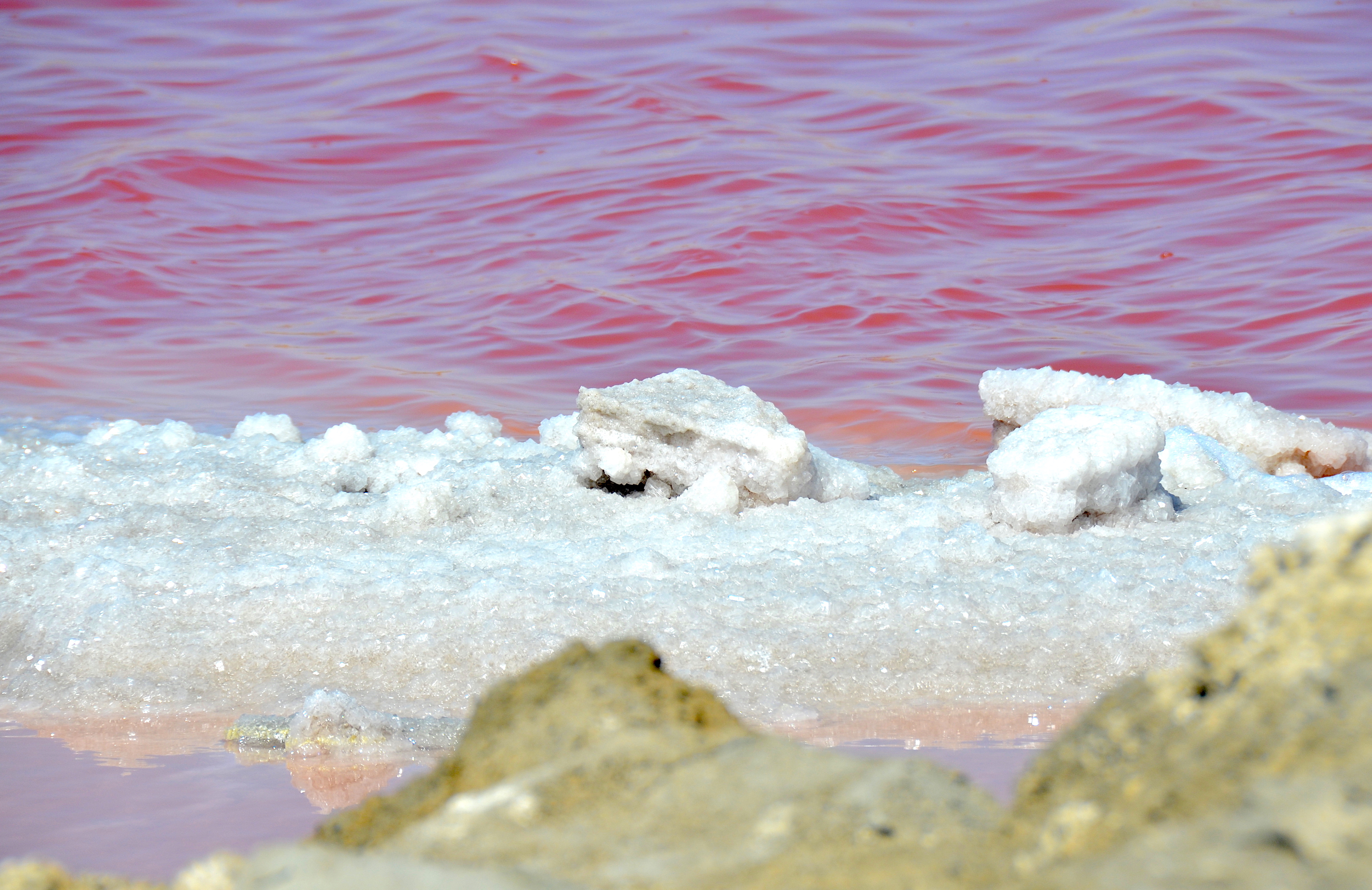 Meersalz an einem Salzgarten in Walvis Bay, Namibia (2014)